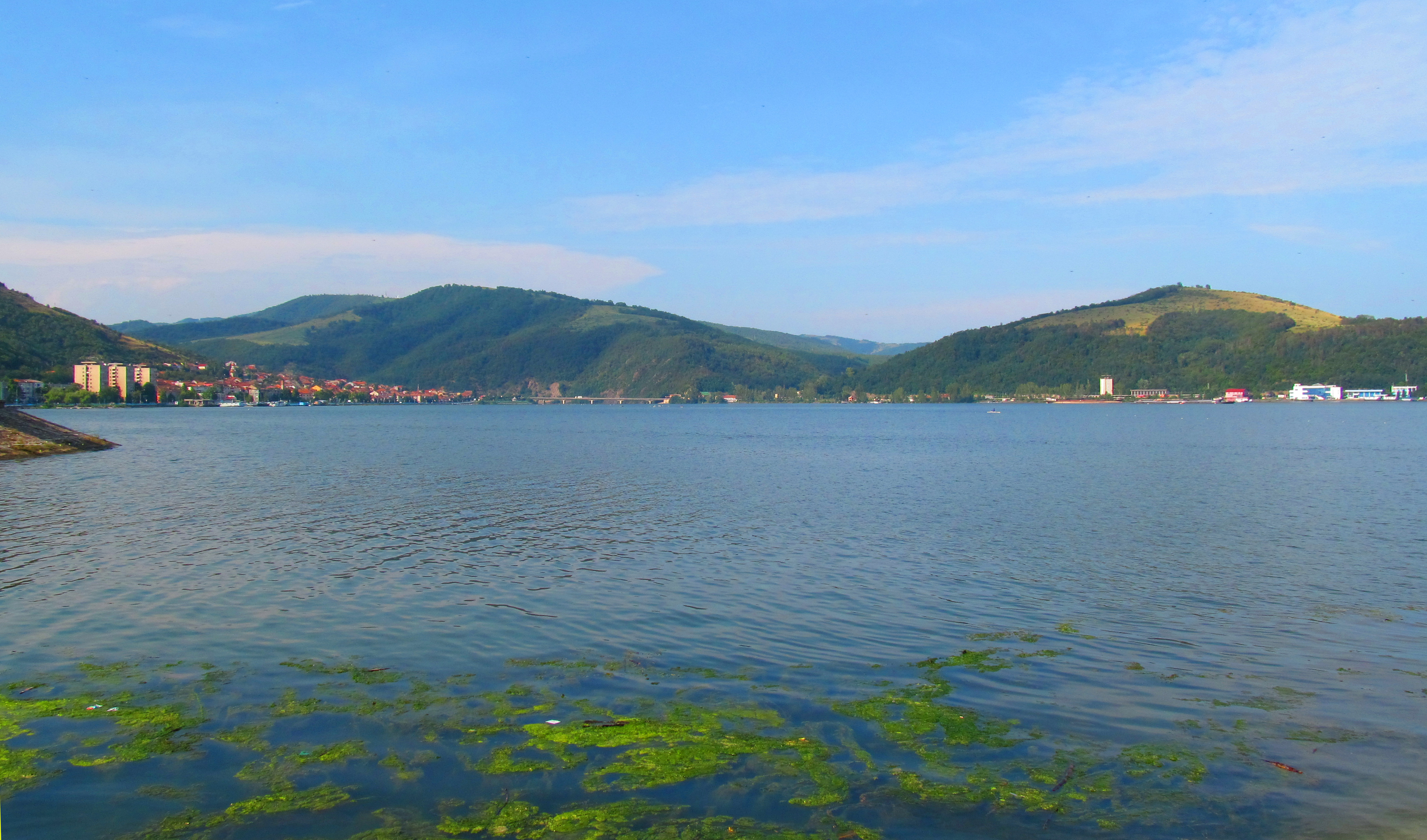 Golful Cerna - Orșova